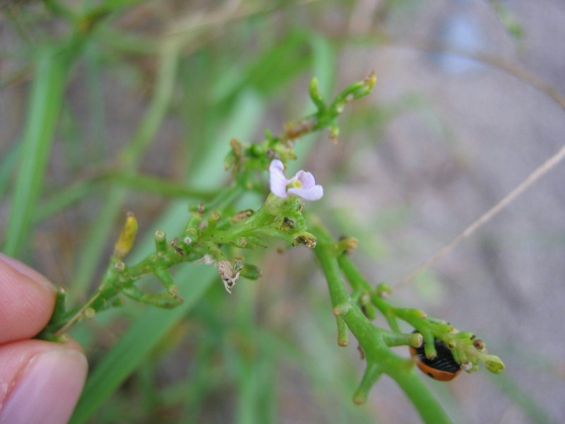 Europäischer Meersenf Cakile maritima